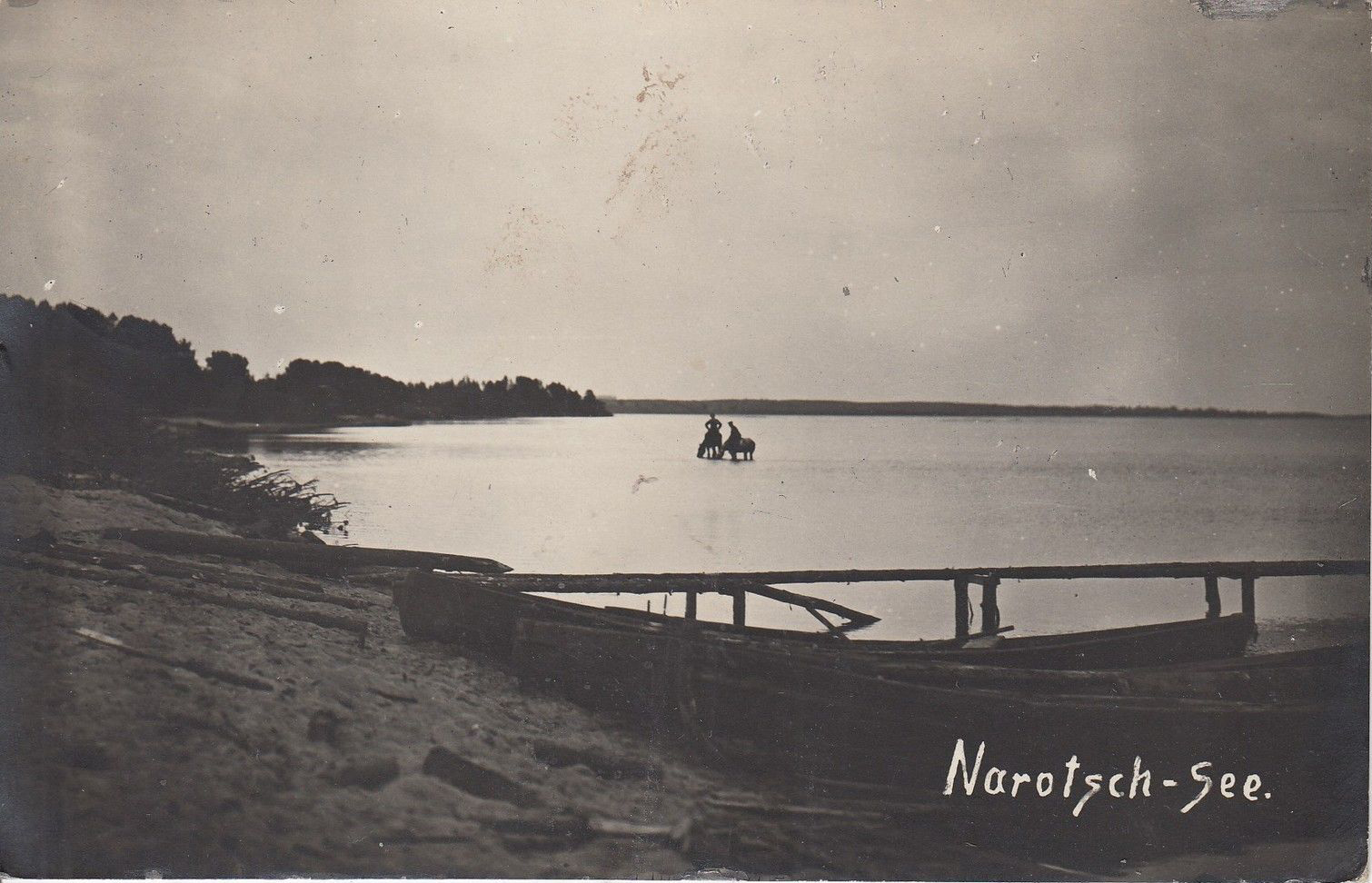 Беларуская (тарашкевіца): Возера Нарач (Narač)